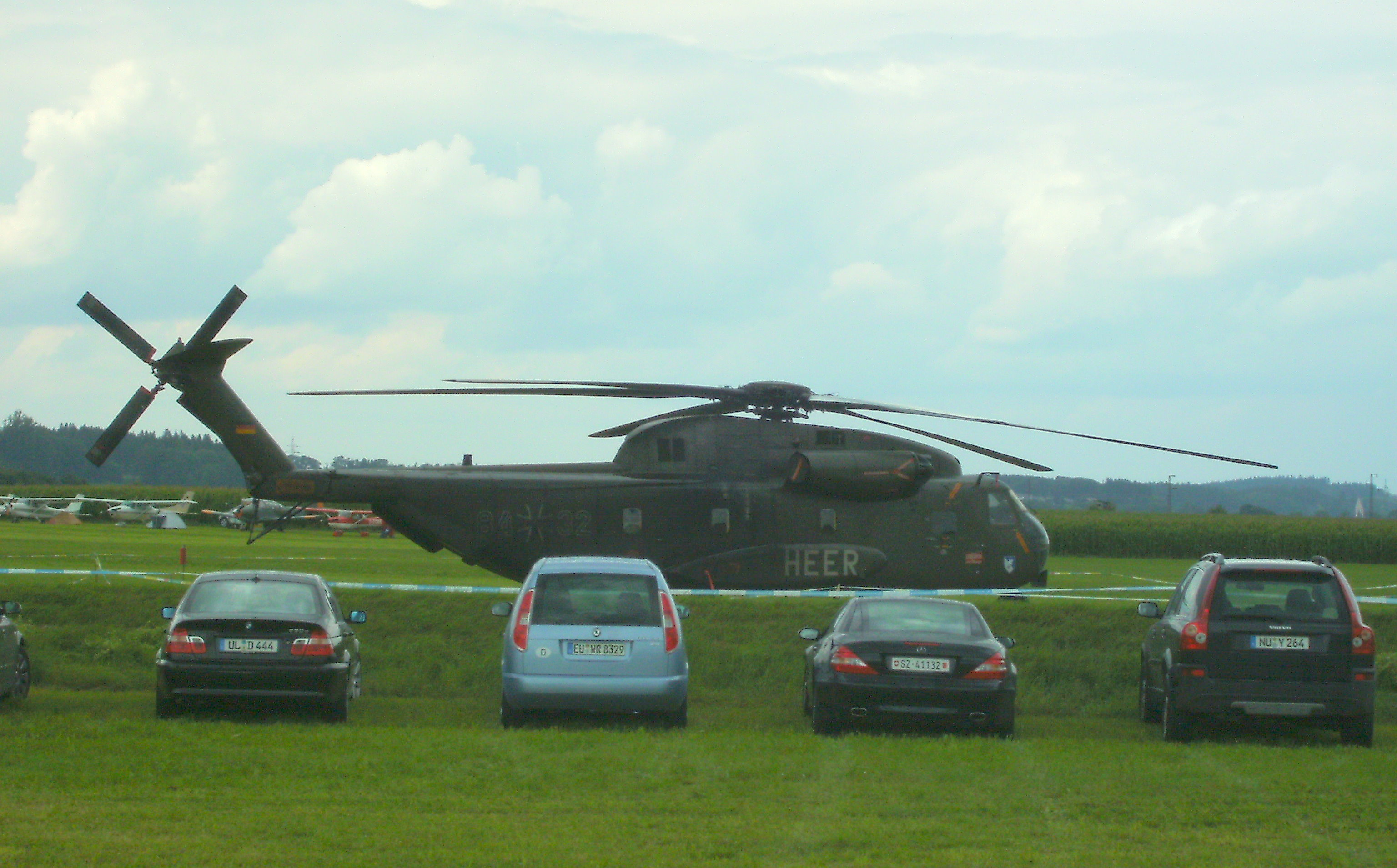 Tannkosh 2008